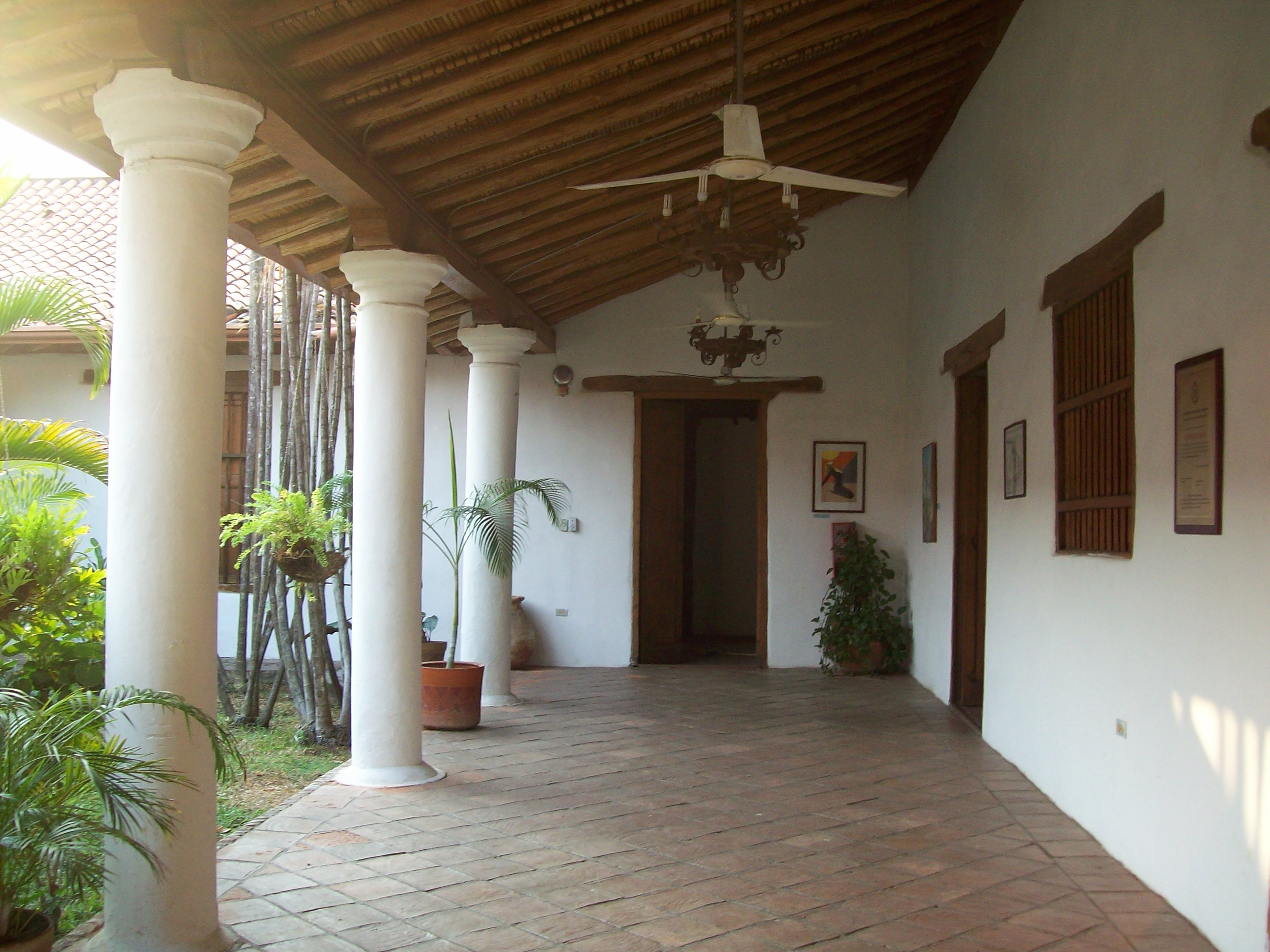 Pasillo donde supuestamente, danzó el Libertador Simón Bolívar en el año 1813.